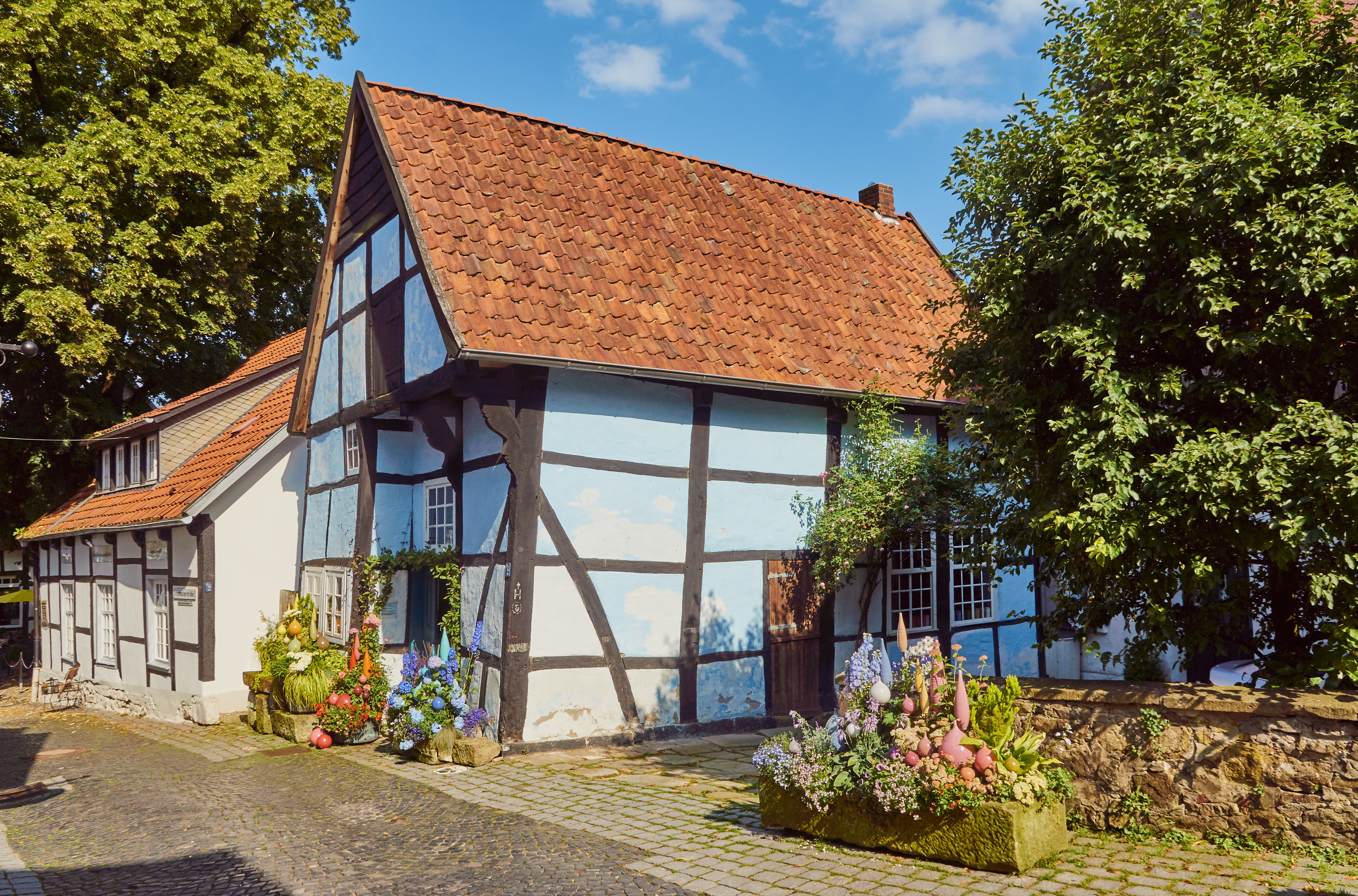 Leinenweberhaus von 1693, Tecklenburg. Das sog. "Schiefe Haus" steht als Fachwerkanbau des Dreiständer-Giebelhauses in der Krummacherstr. 3 unter Denkmalschutz (Kurzbeschreibung aus der Denkmal-Datenbank des Kreises Steinfurt). Es erhielt den 1. Preis in der Kategorie "Kulturelles Erbe" bei den European Conservation Awards 1989. This is a photograph of an architectural monument.